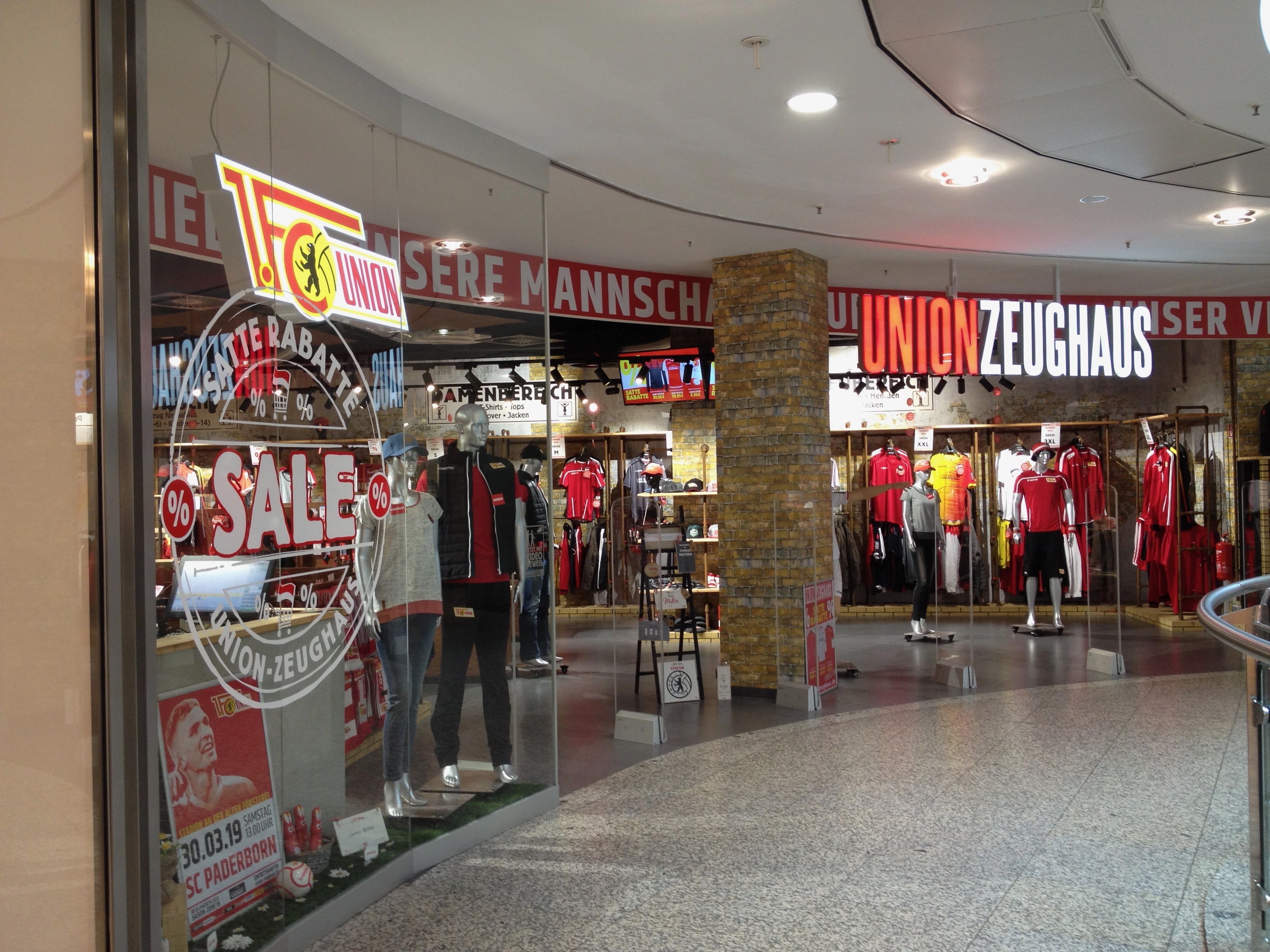 Fanshop des Fußballclubs 1. FC Union Berlin